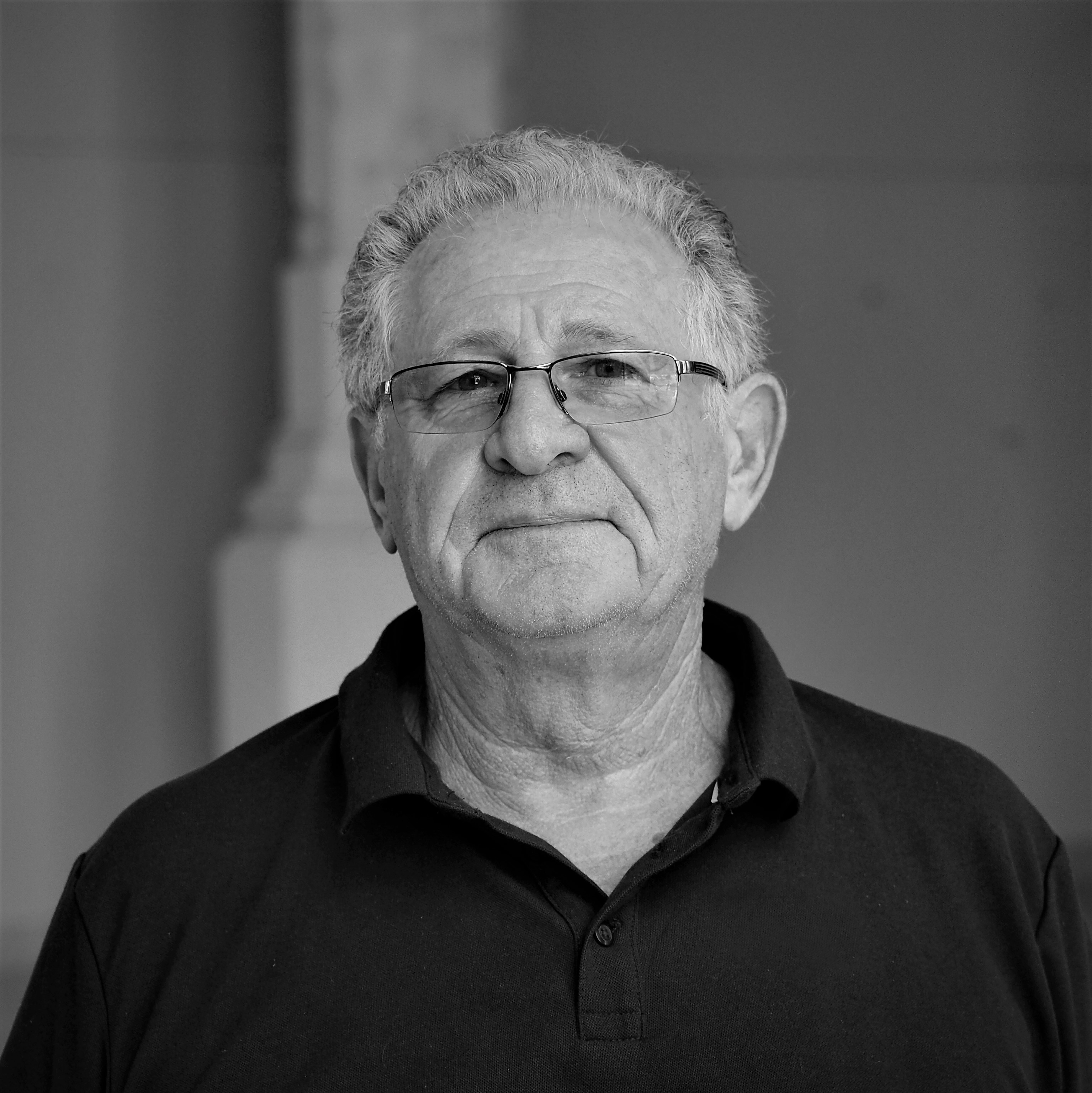 Szenes István Ybl-díjas belsőépítész, Magyarország Érdemes Művésze, a Magyar Művészeti Akadémia rendes tagja (Budapest V. kerület Vigadó tér 1, Pesti Vigadó, 20 éves az év belső építésze díj kiállítás)